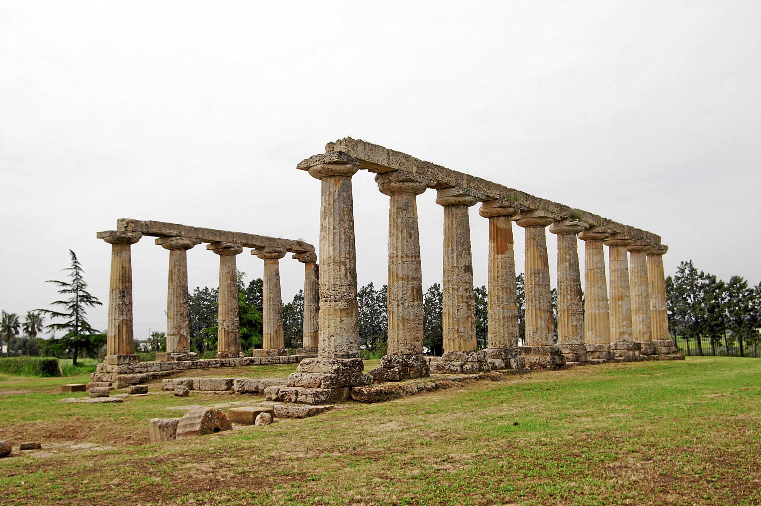 "Tavole Palatine", griech. Hera-Tempel